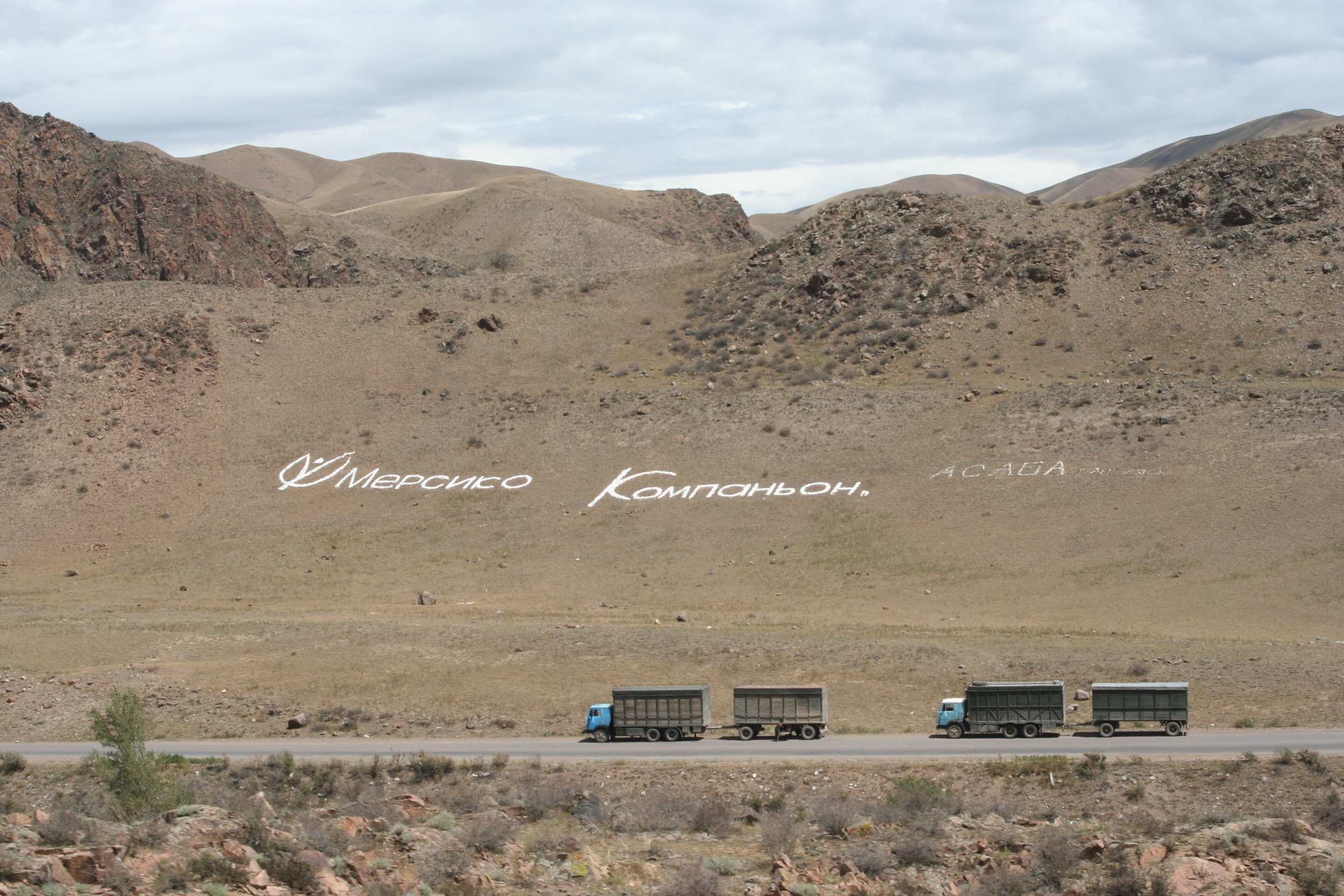 Straße von Bishkek an den Yssykköl